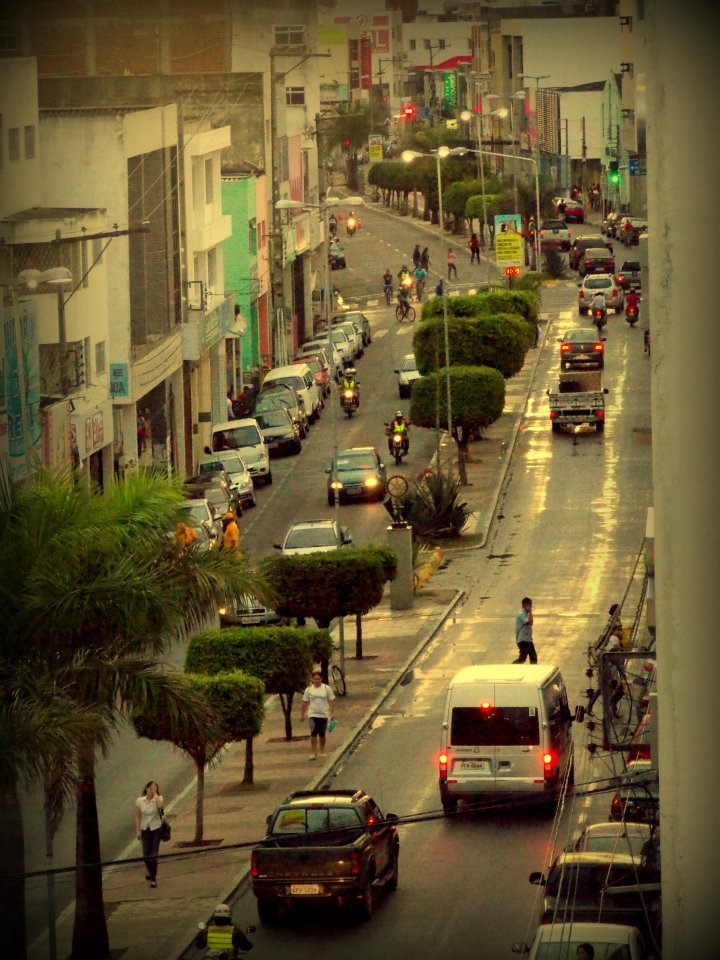 dia de chuva na capital do sertão pernambucano